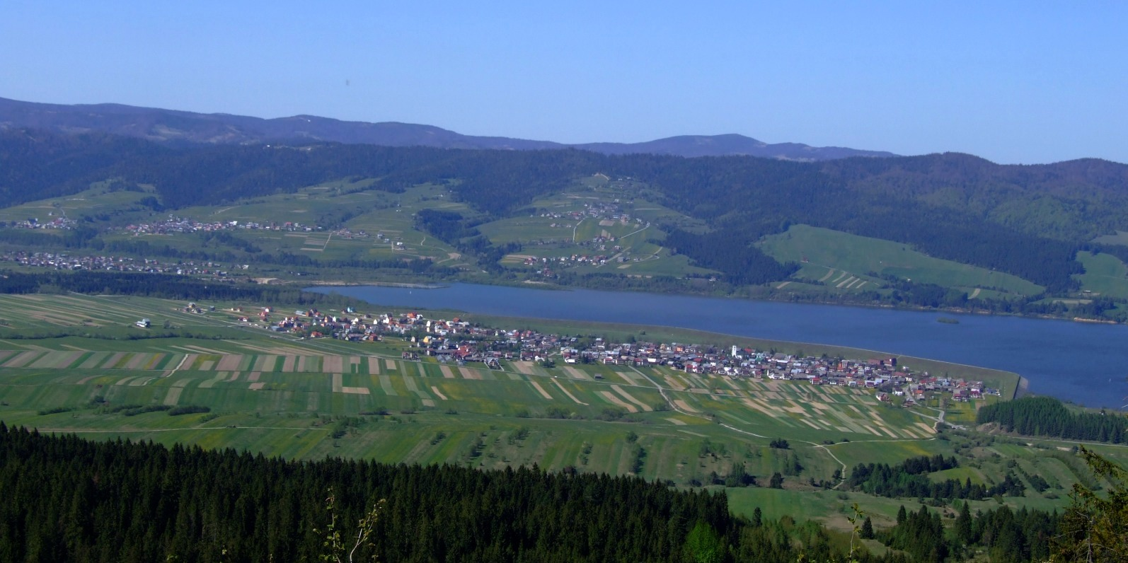 Frydman nad Jeziorem Czorsztyńskim, widok z Żaru